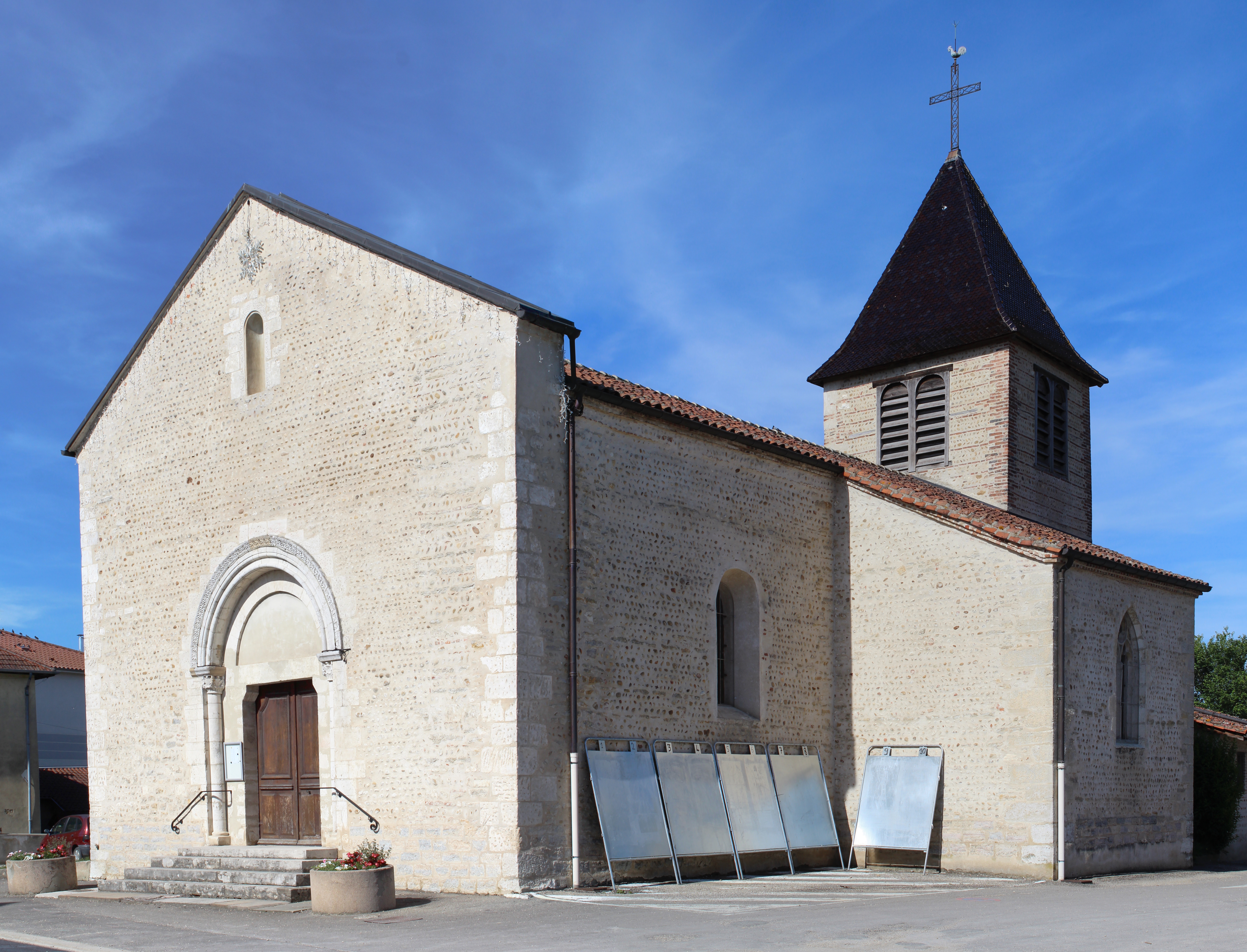 Église Saint-Nizier de Saint-Nizier-le-Désert.